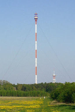 Sendetürme Berlin-Frohnau - selbst fotografiert - gemeinfrei